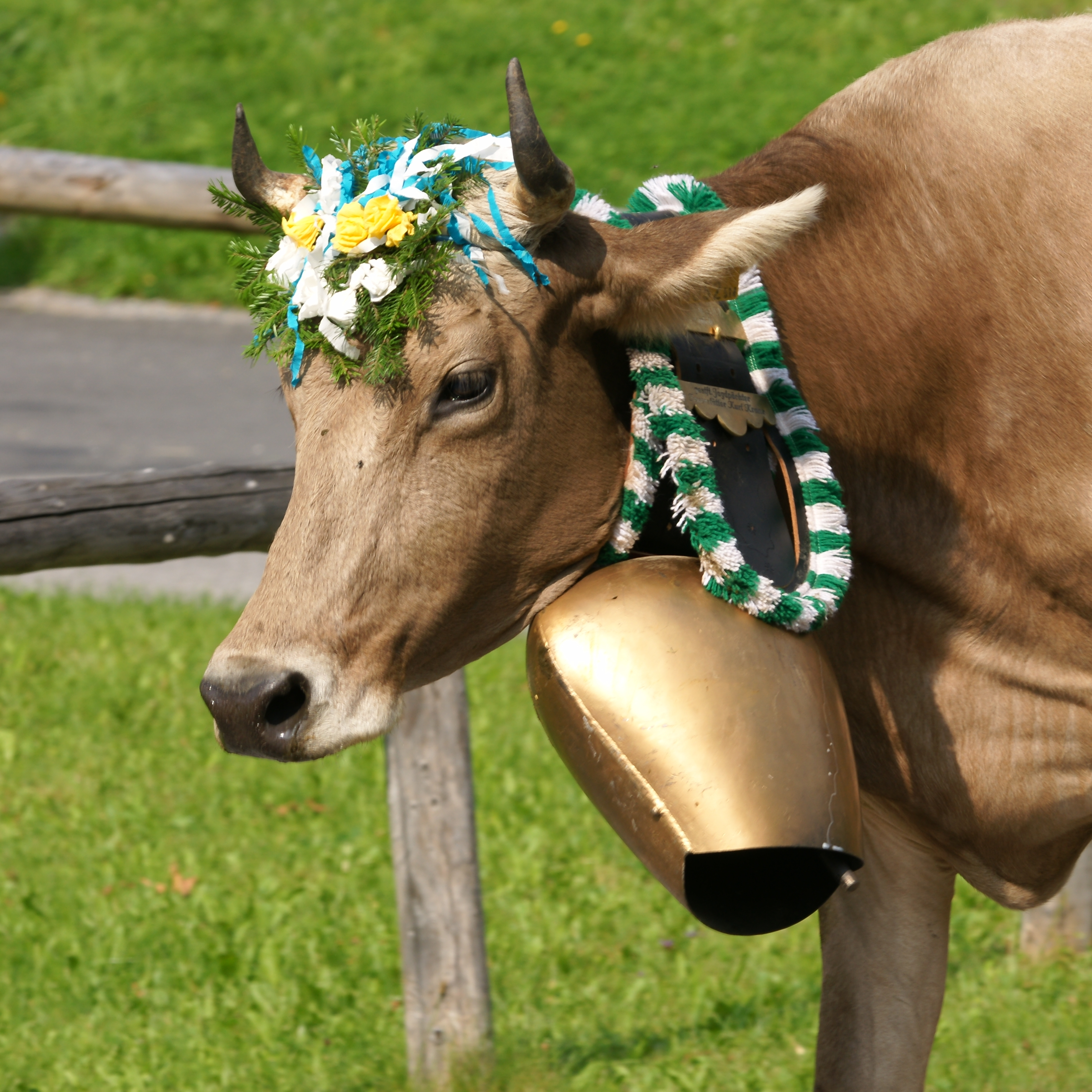 Braunvieh geschmückt vom Almabtrieb in Sibratsgfäll. Auf dem Glockenband steht: gessft. Jagdpächter Feuerstätter Kurt Kranz.